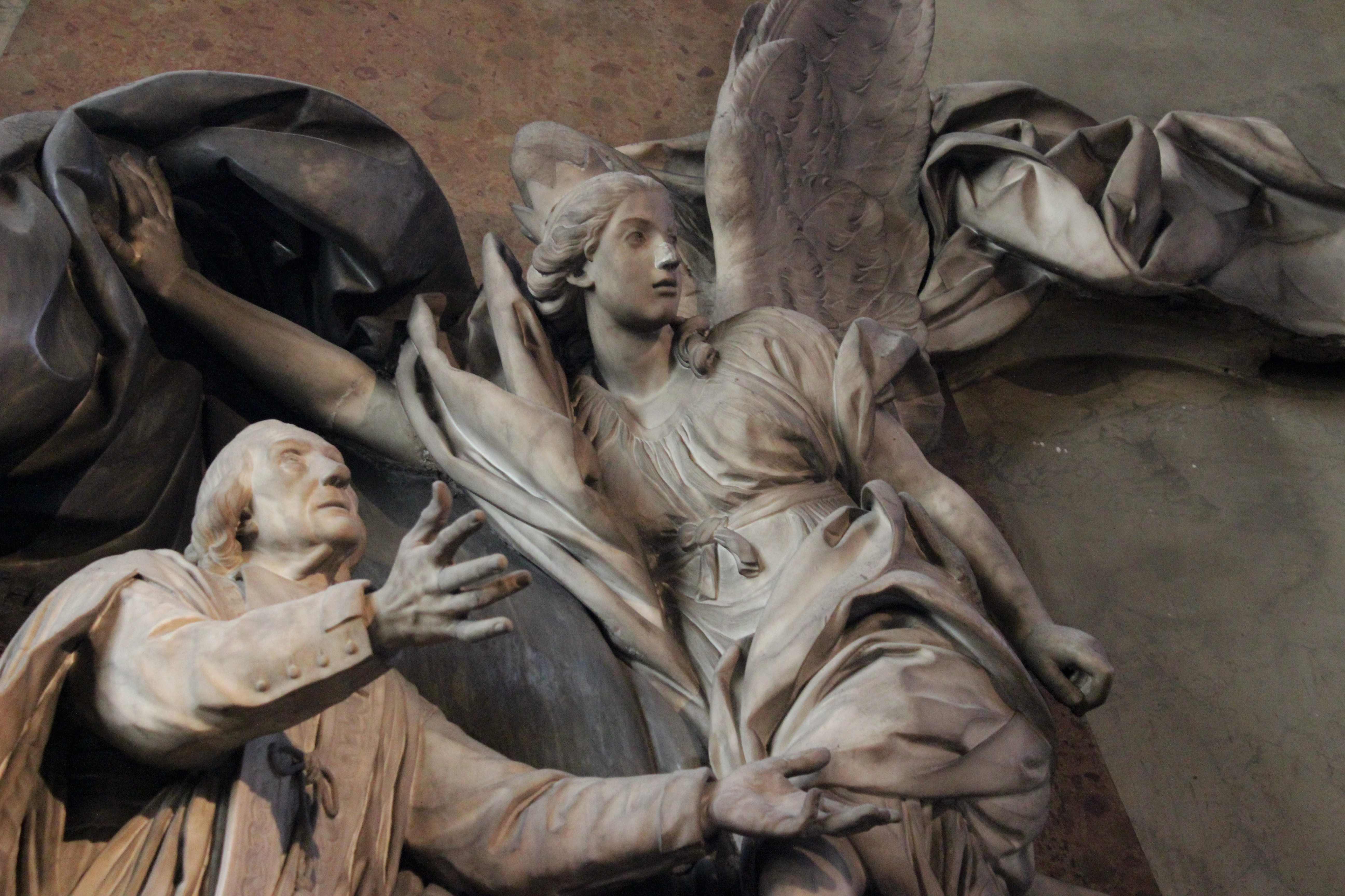 París, Saint Sulpice. Monumento a Jean-Baptiste Languet de Gergy.